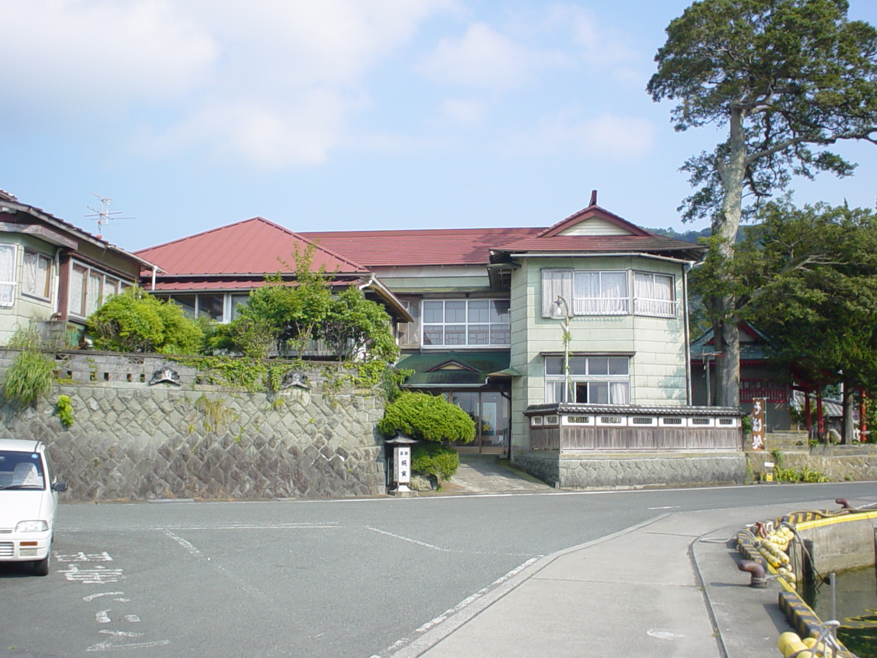 松崎町の旅館梶寅。1990年の映画『つぐみ』の撮影地。